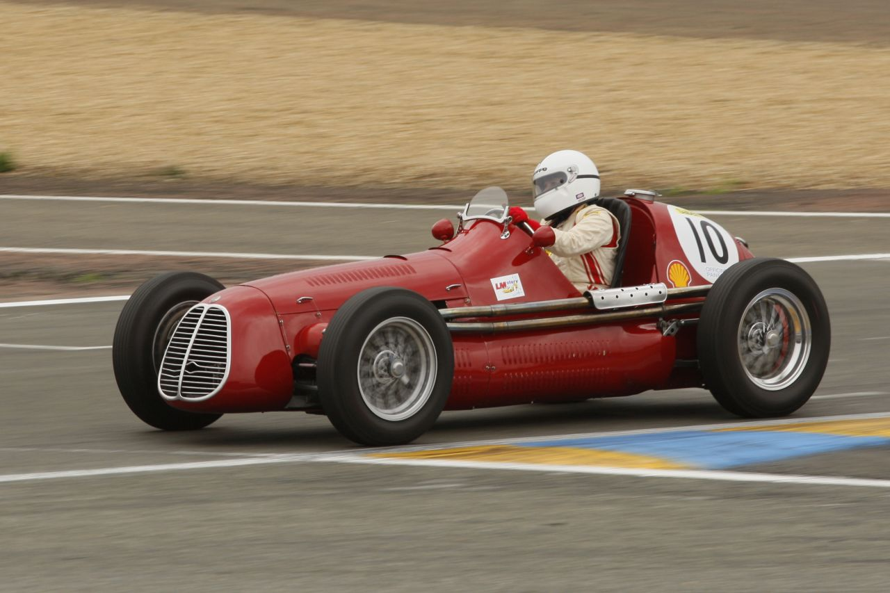 Maserati A6GCM de Julia DE BALDANZA